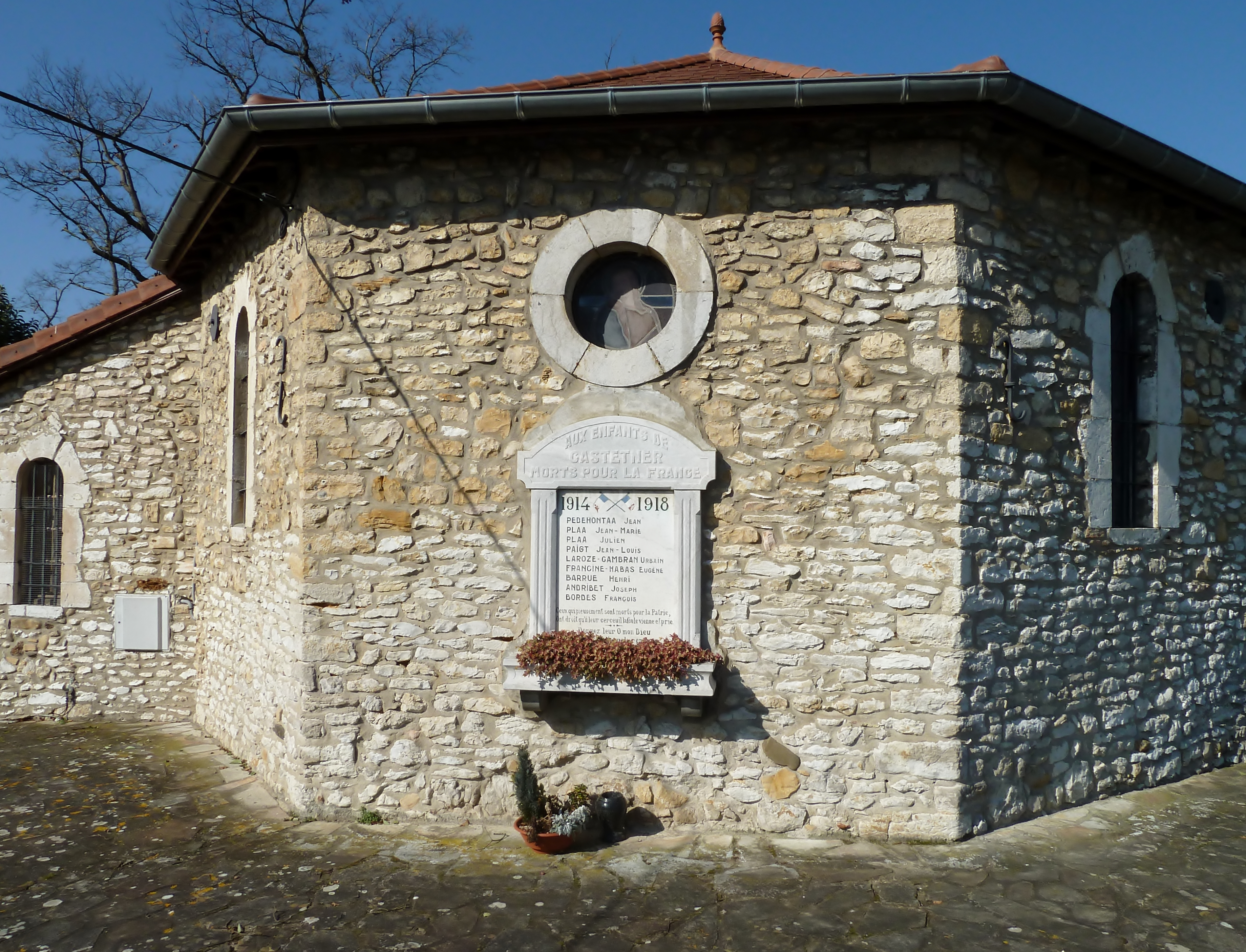 Monument aux morts de Castetner